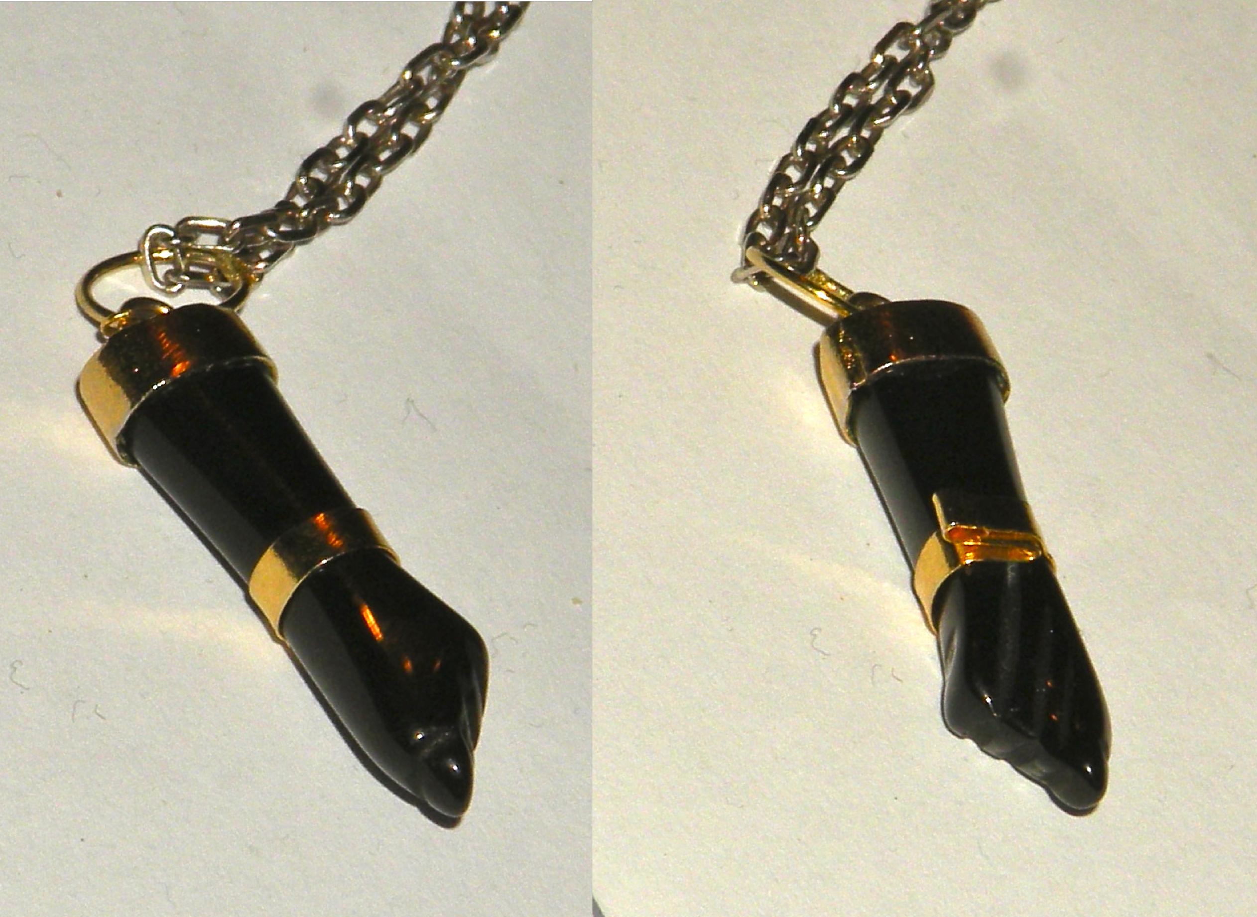 pendentif Figa recto verso